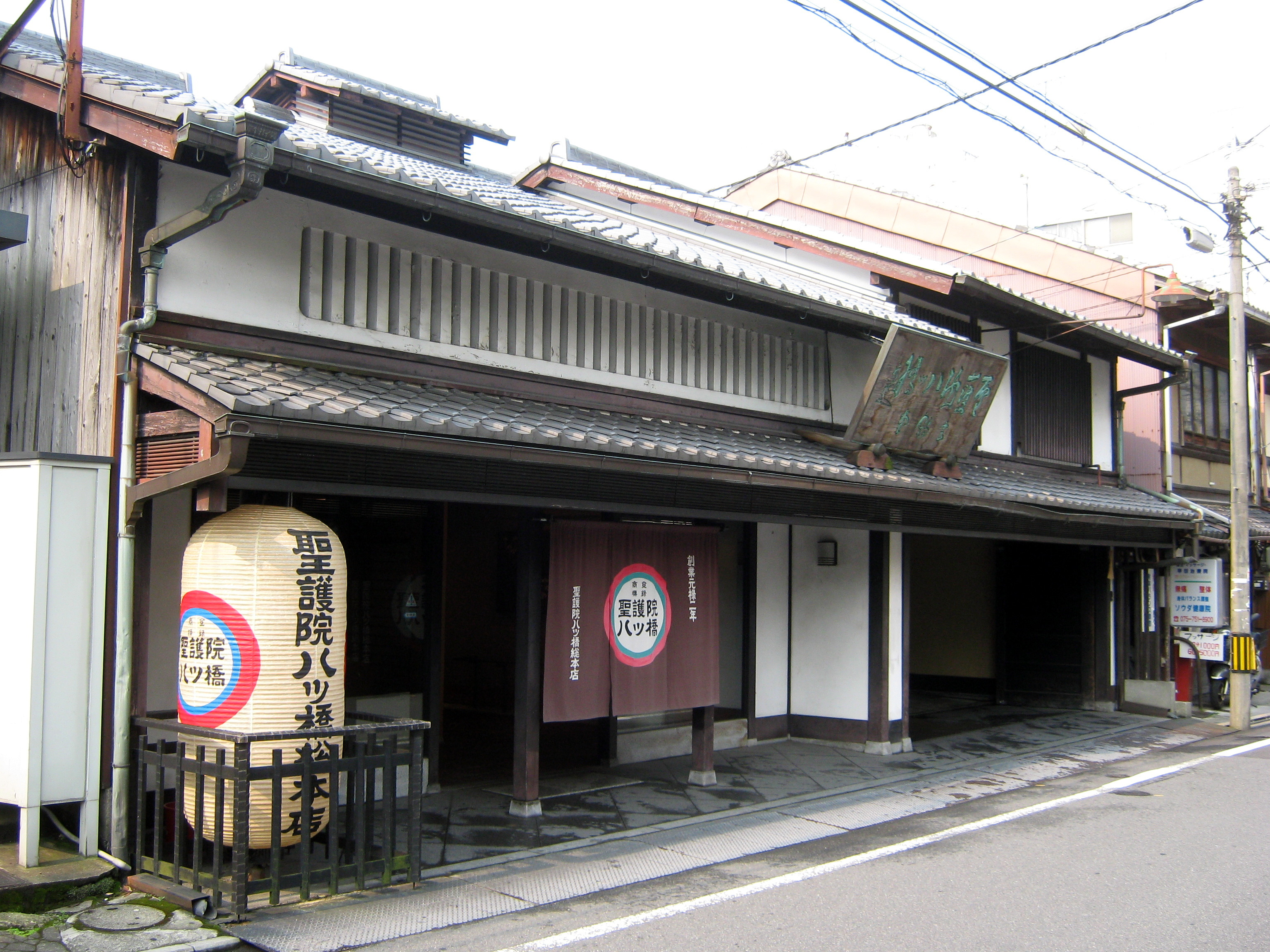 聖護院八ツ橋総本店。